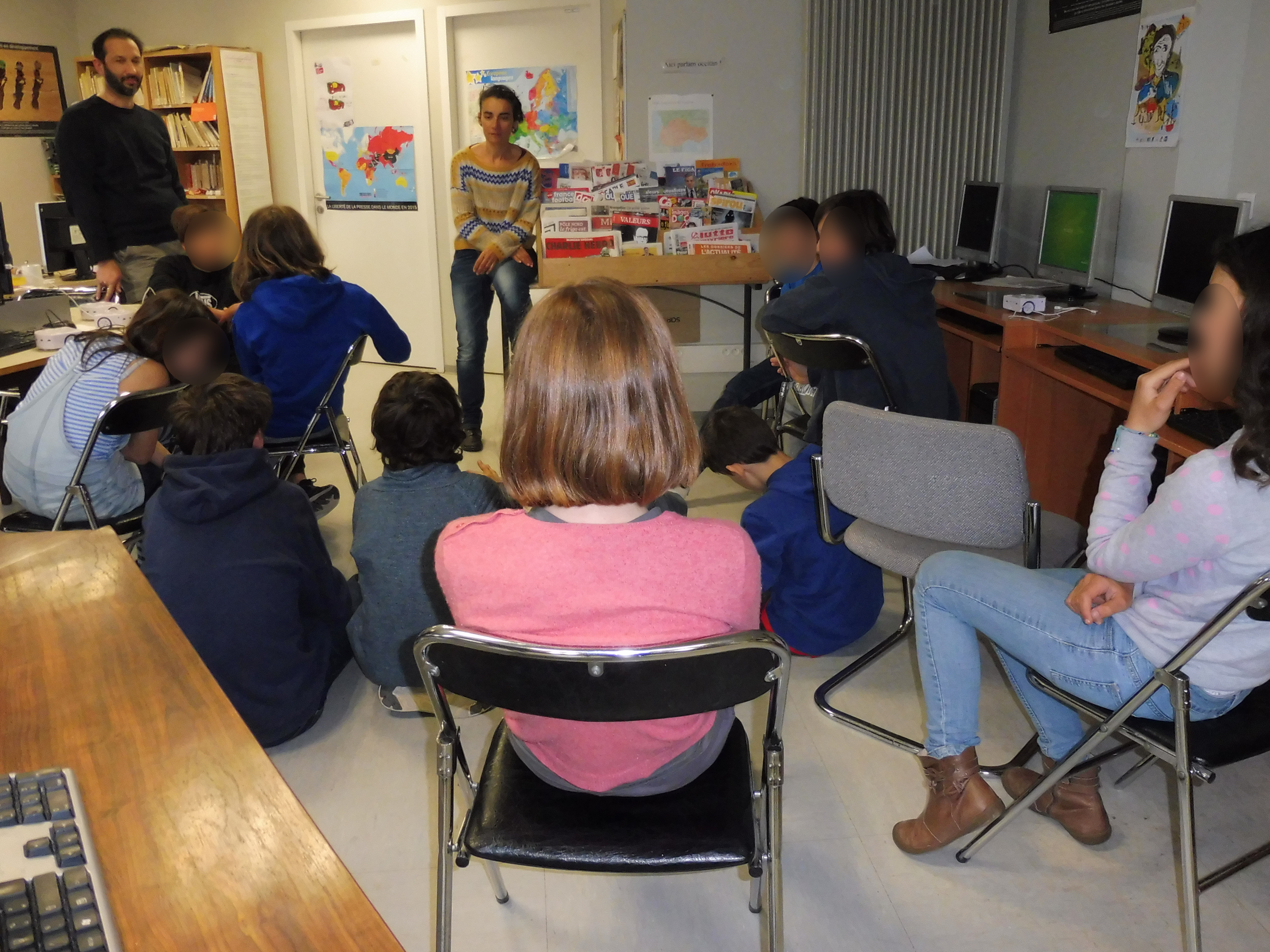 Le robot Thymio au collège calandreta de Montpellier. Debriefing de fin de séance et partage d'expérience. La semaine prochaine, visite des halles robotiques du LIRMM où travaille Christine.